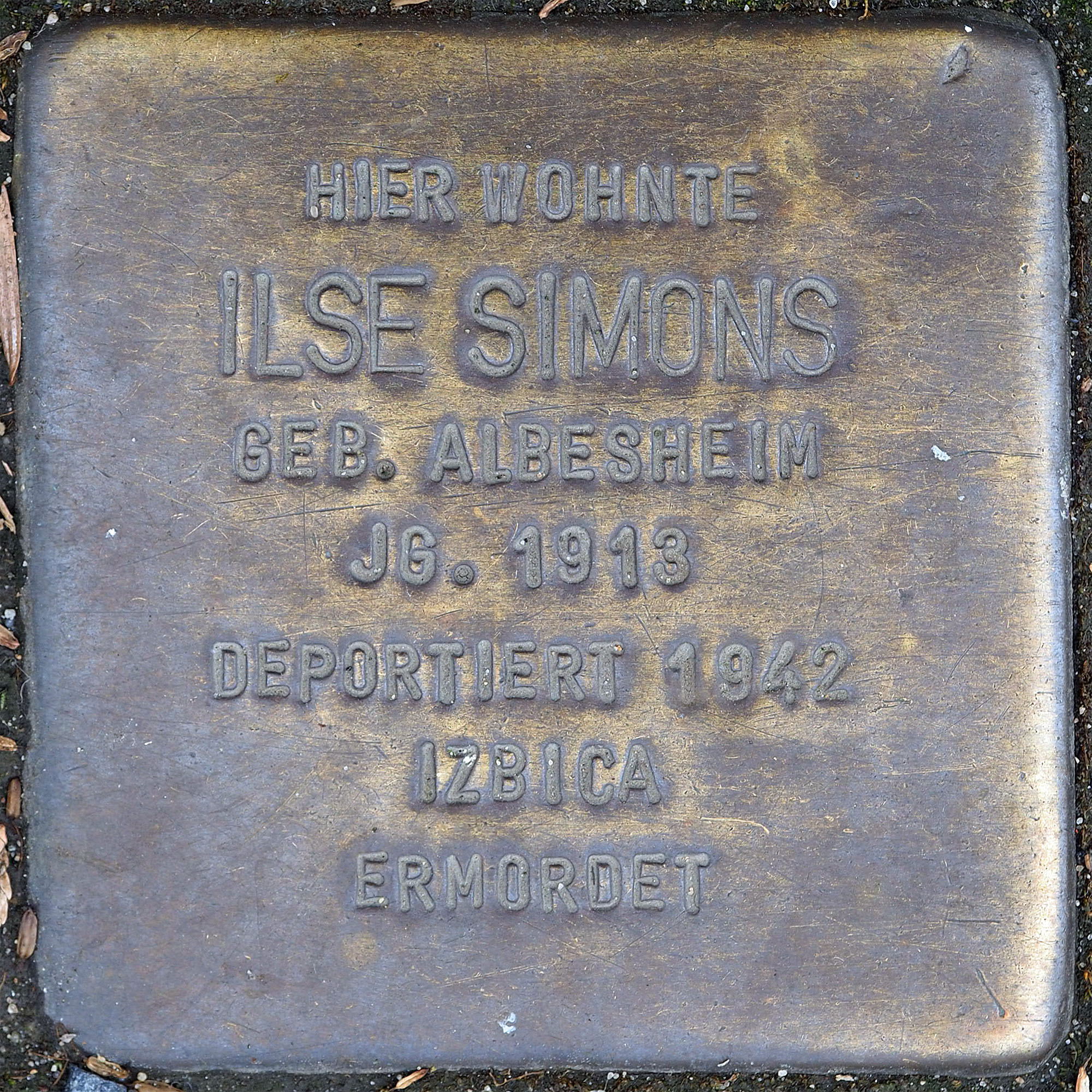 Stolpersteine MG: Simons, Ilse